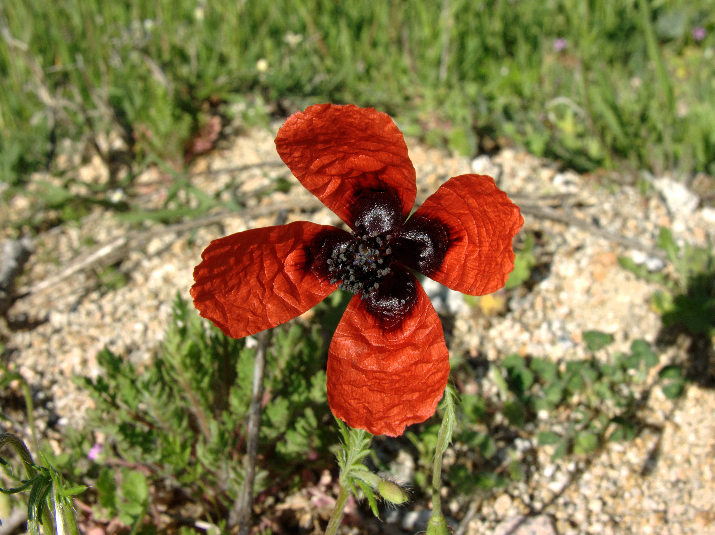 Papaver argemone (Papaveraceae). Cercedilla, Madrid, España.